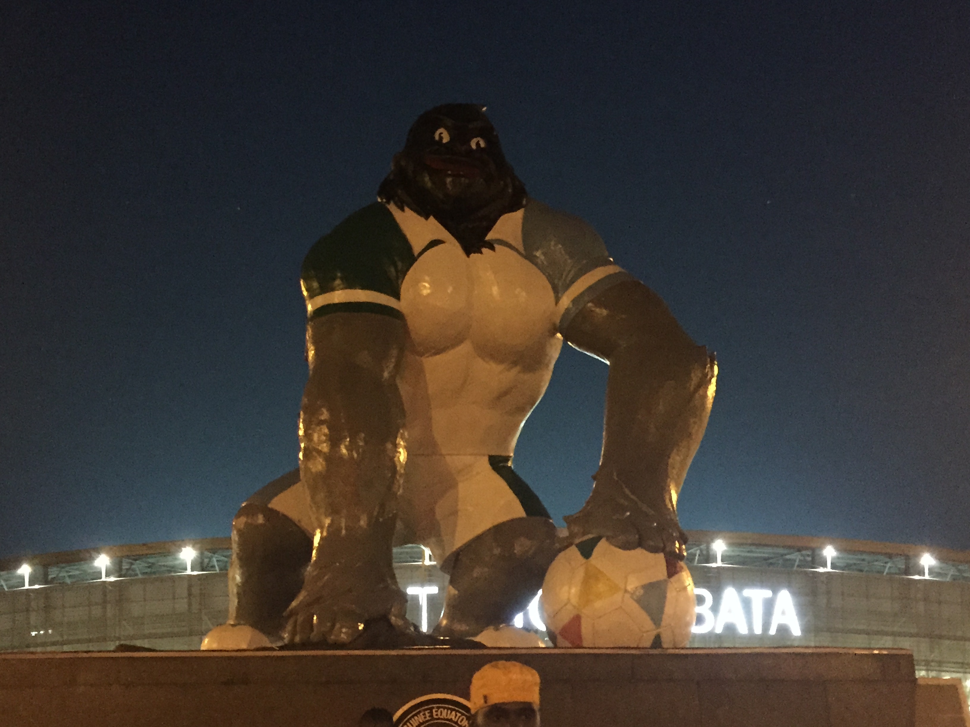 Estadio de Bata (Guinea Ecuatorial).